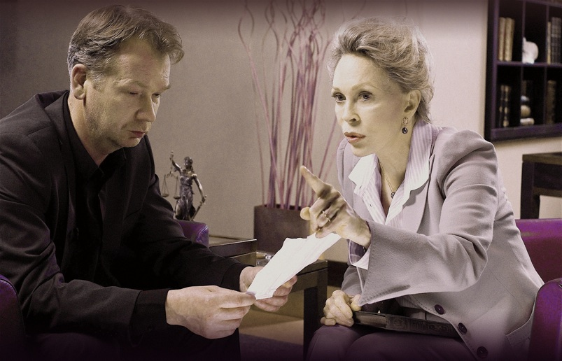 Balladyna